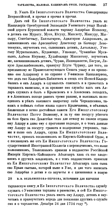 Склейка фрагментов двух страниц из книги В. В. Вельяминов-Зернов, «Источники для изучения тарханства, жалованного башкирам русскими государями», 1864 год, с. 27 и 28